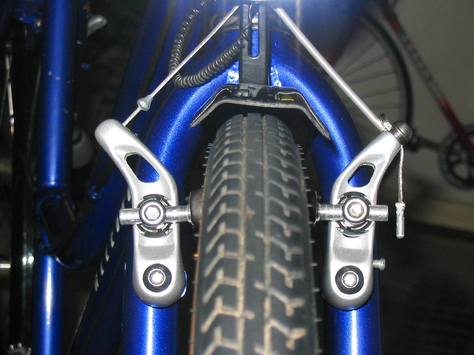 Shimano Alivio cantilever brake